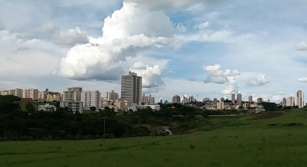 Vista da Cidade a a partir da Rodovia Fabio Talarico, Franca (SP), Brazil